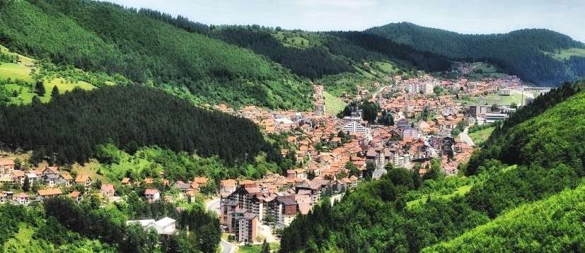 Нова Варош